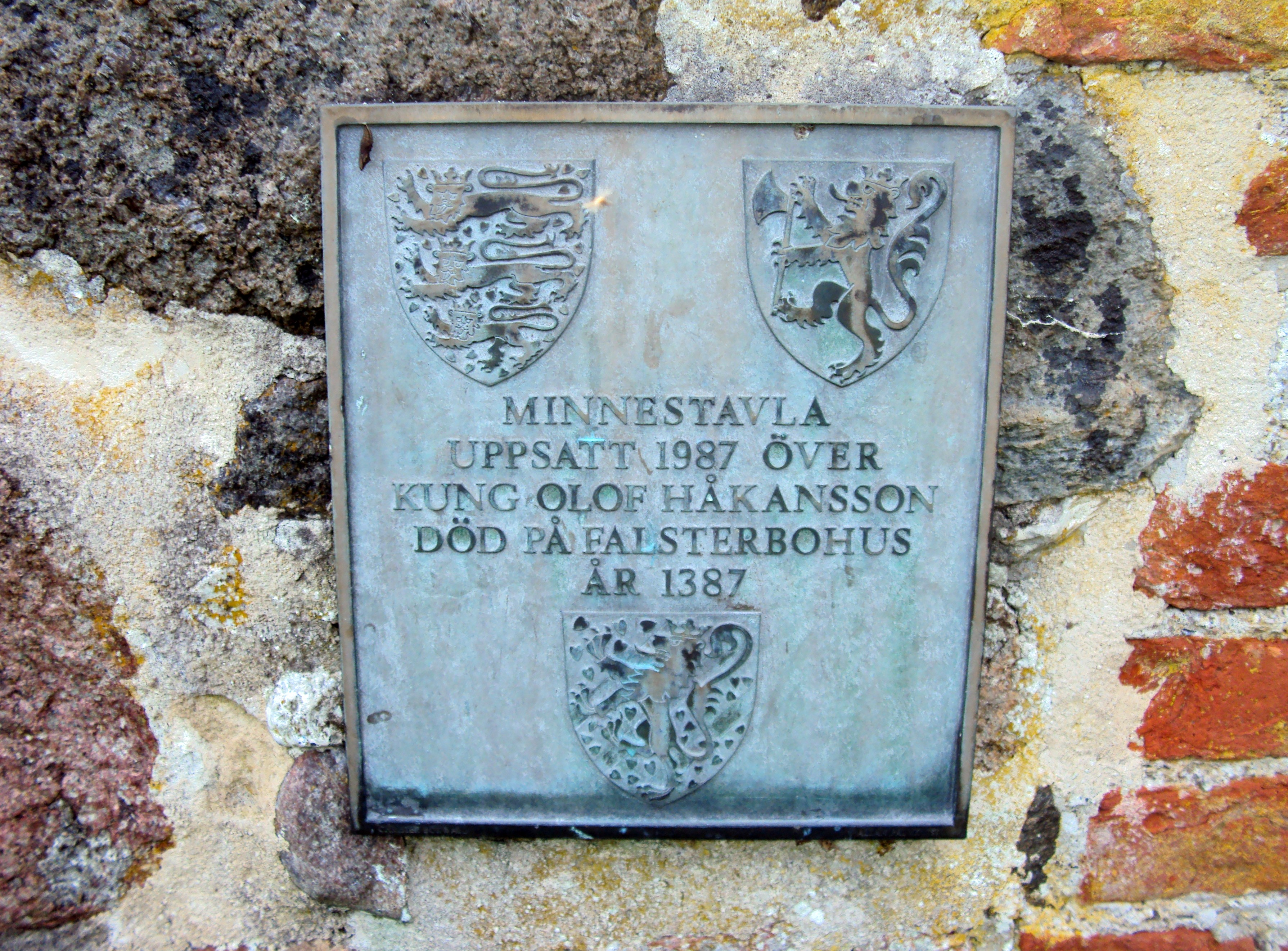 Minnestavla över kung Olof Håkansson: "Minnestavla uppsatt 1987 över kung Olof Håkansson död på Falsterbohus 1387" Tavlan är placerad på ruinen.